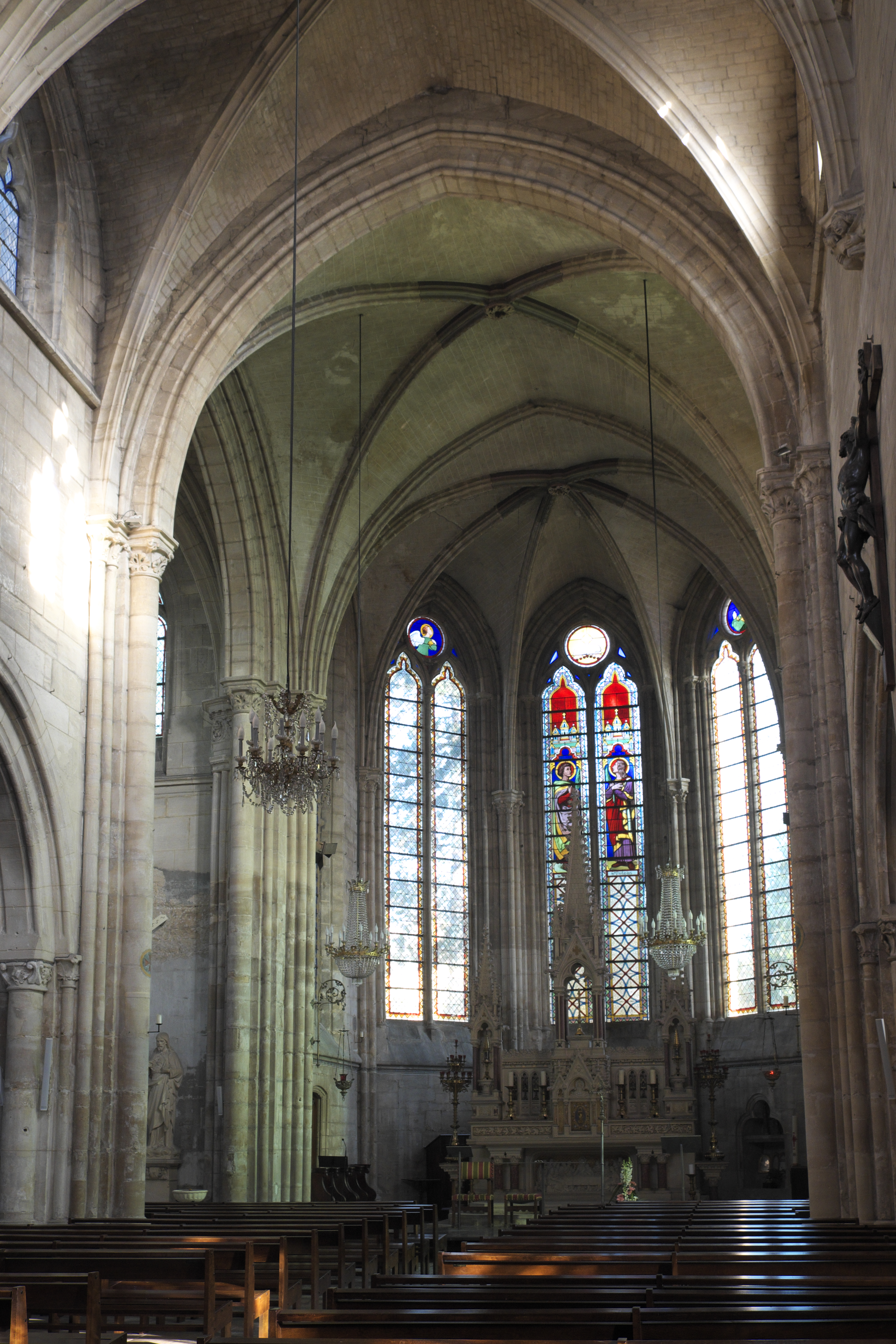 Katholische Pfarrkirche Saint-Gervais-Saint-Protais in Bessancourt im Département Val-d’Oise (Île de France/Frankreich), Innenraum mit Blick zum Chor